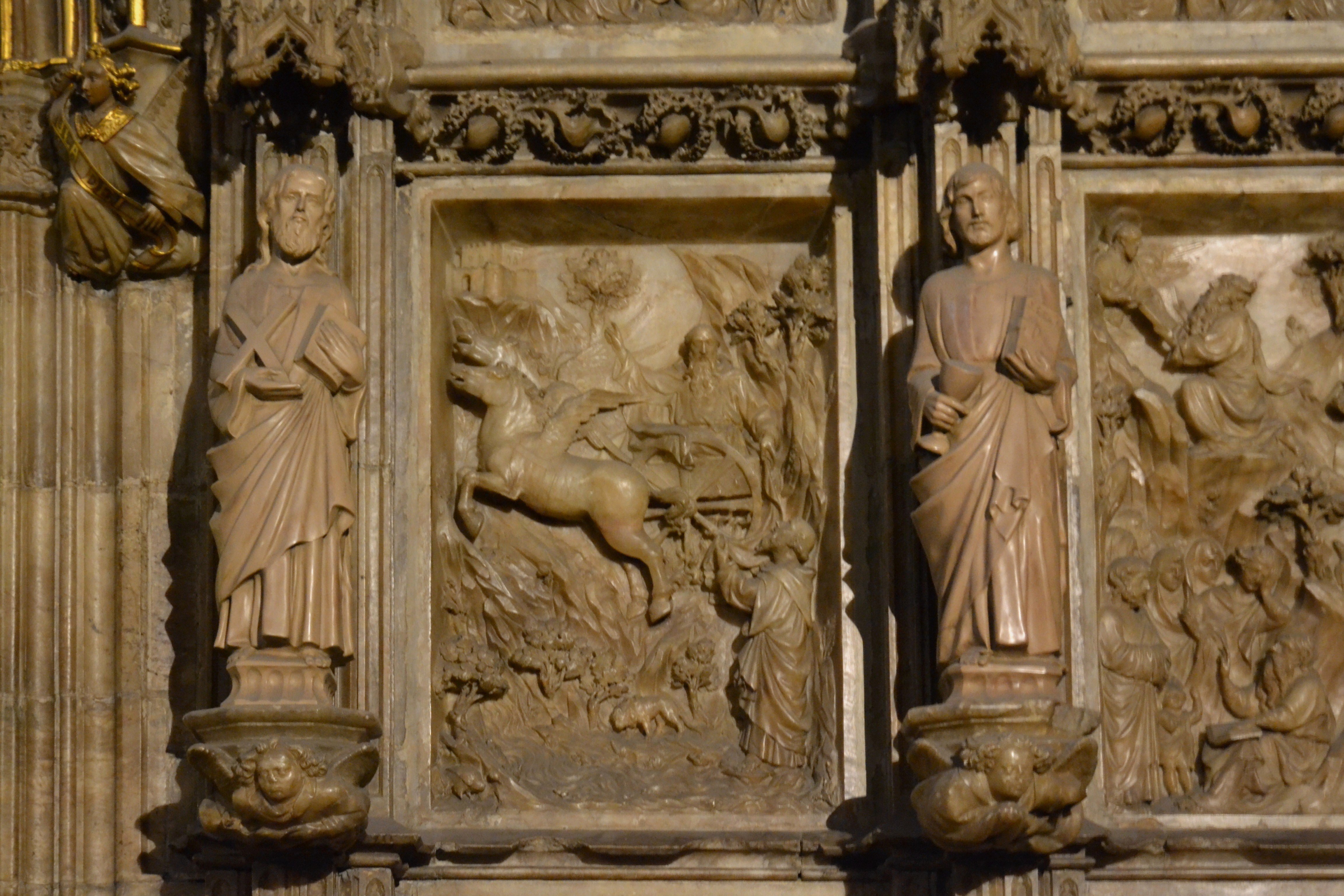 Elies i el carro de foc, retaule de la capella del sant Calze, catedral de València.